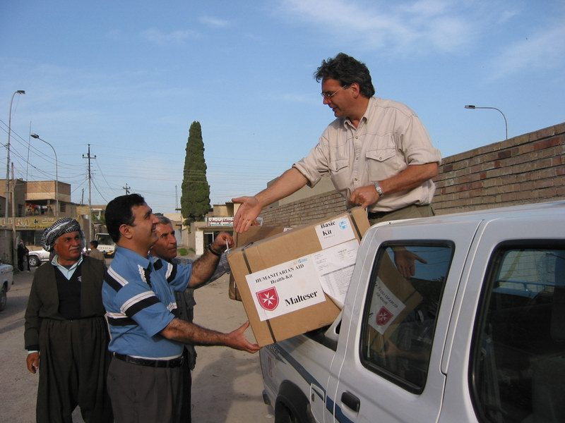 GNU-FDL laut Mail des Generalsekretariats Koln des Malteser Hilfsdienst e.V. am 27.7.2004